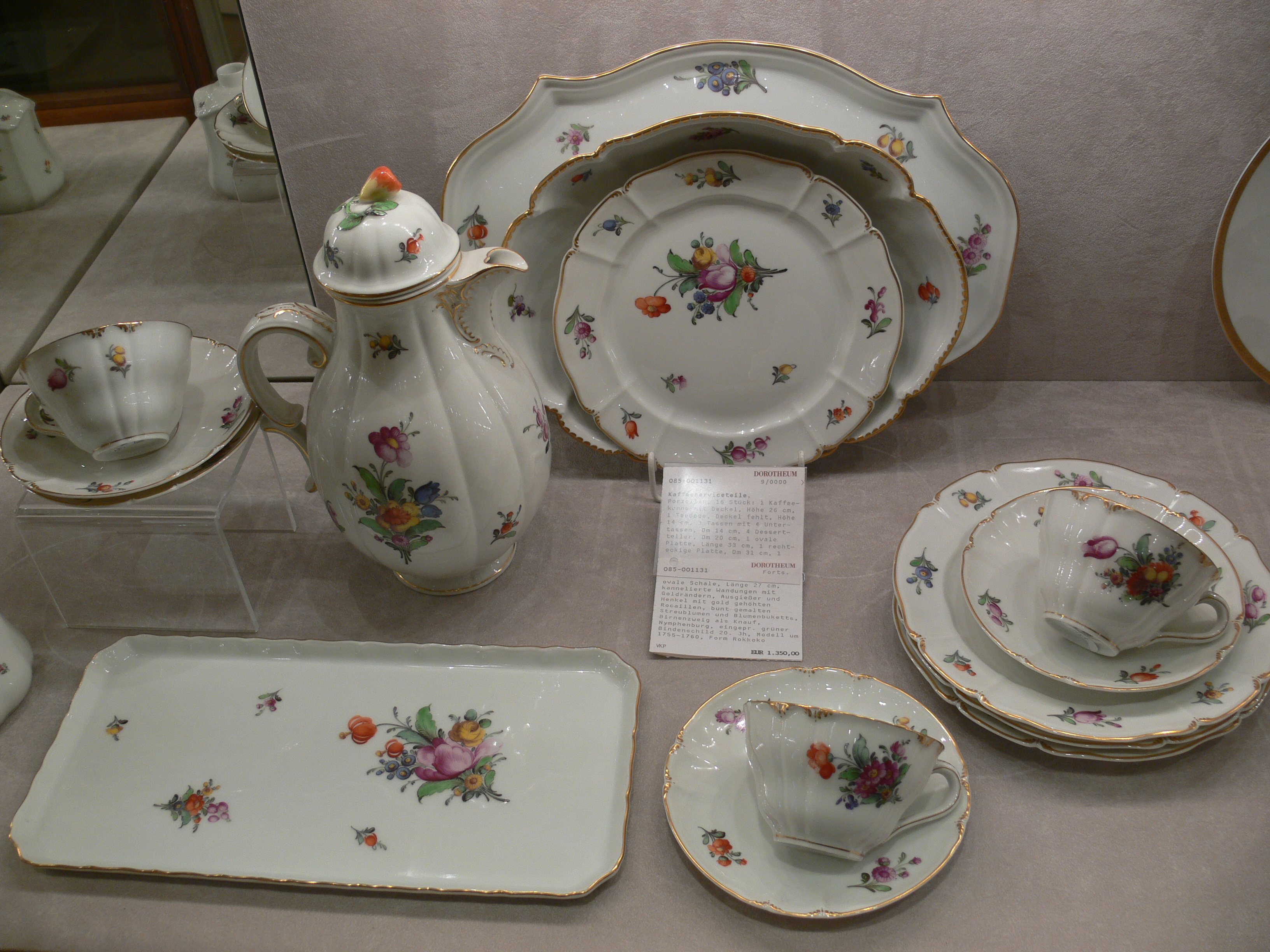 Teile eines Kaffeeservices, Nymphenburg, Modell um 1755-1760, hergestellt im 20. Jh. (eingeprägter grüner Bindenschild); fotografiert im Dorotheum Wien